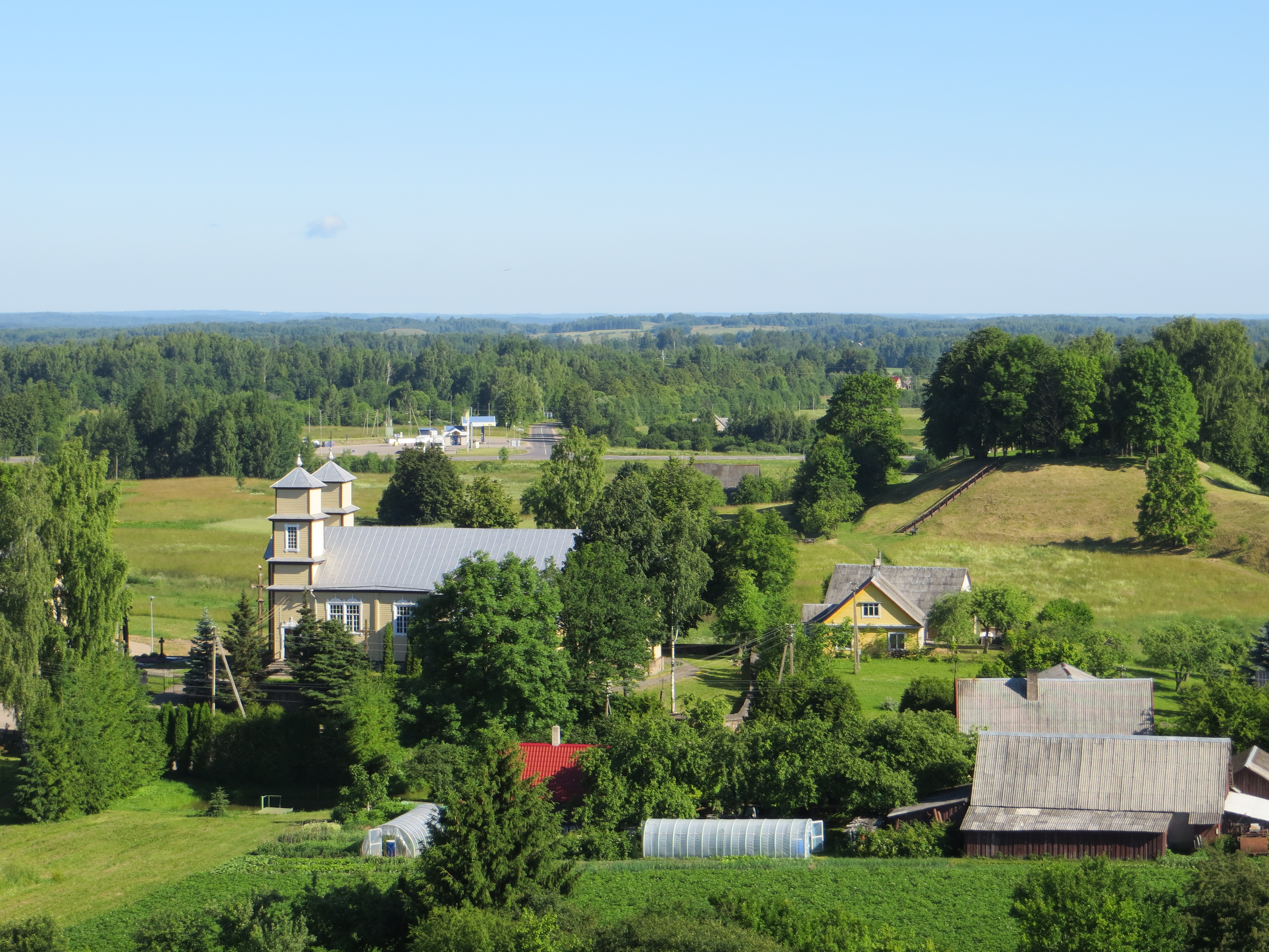 Daugailiai, Lithuania